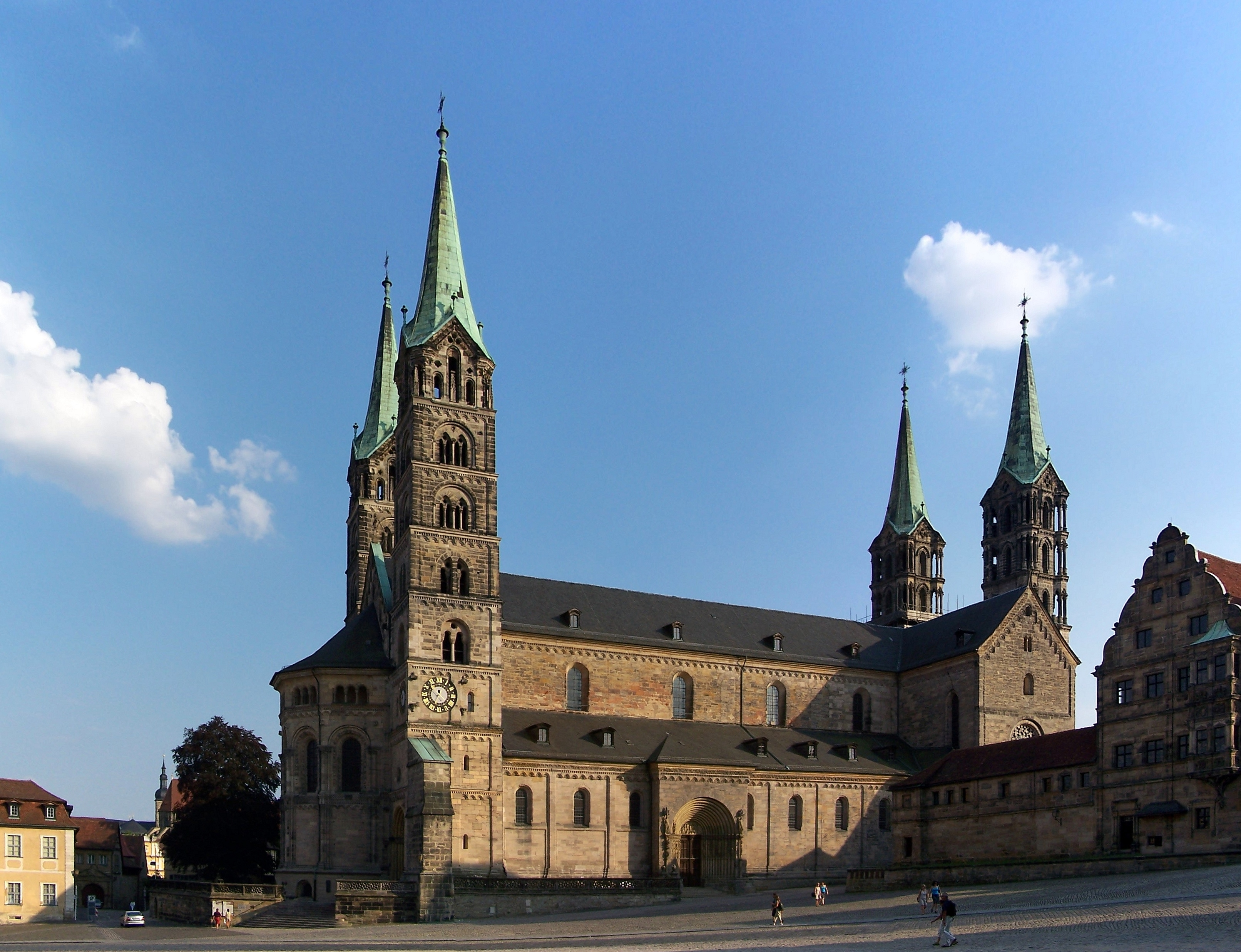 Bamberg, Dom